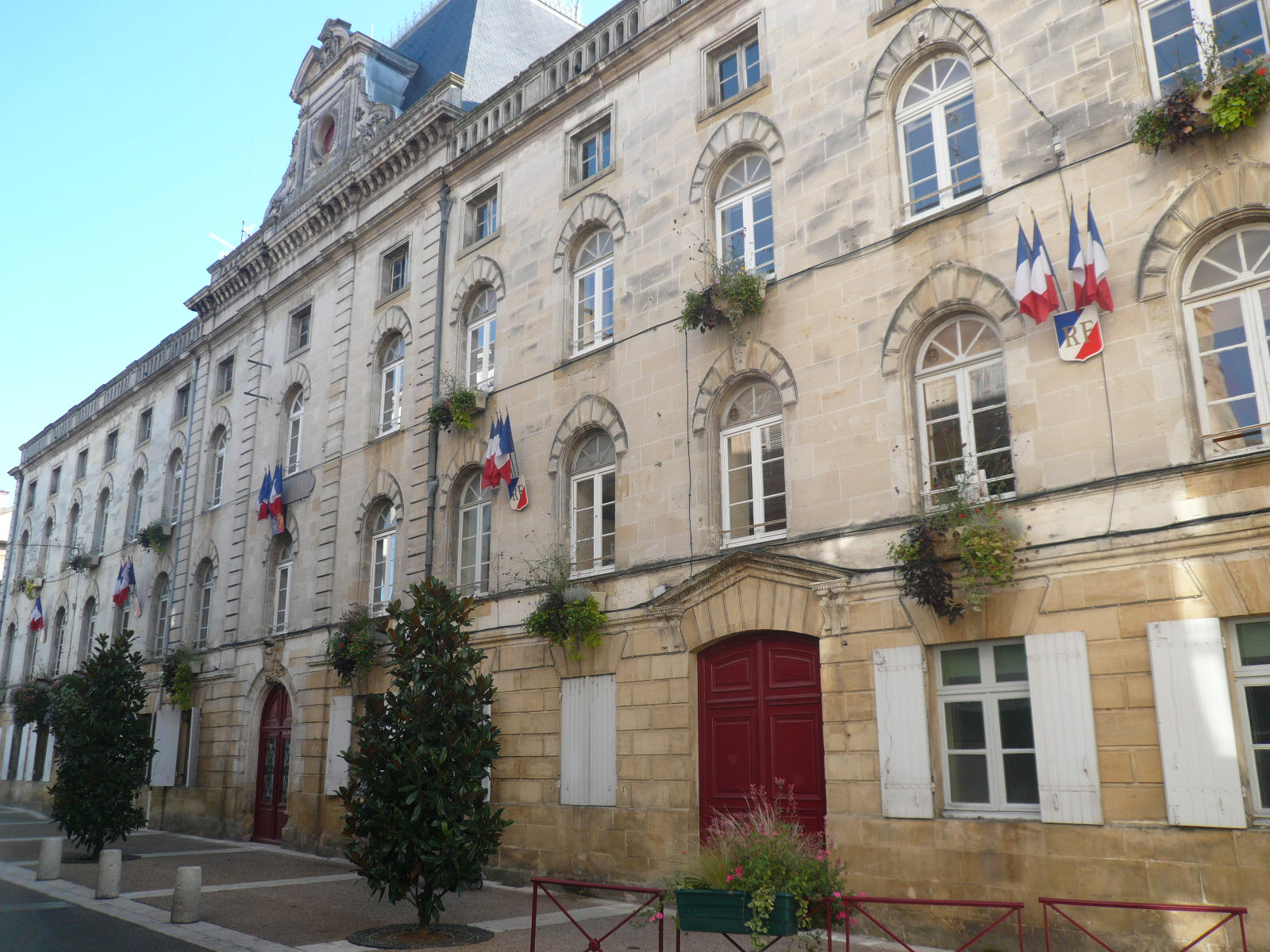 Mairie de Bergerac